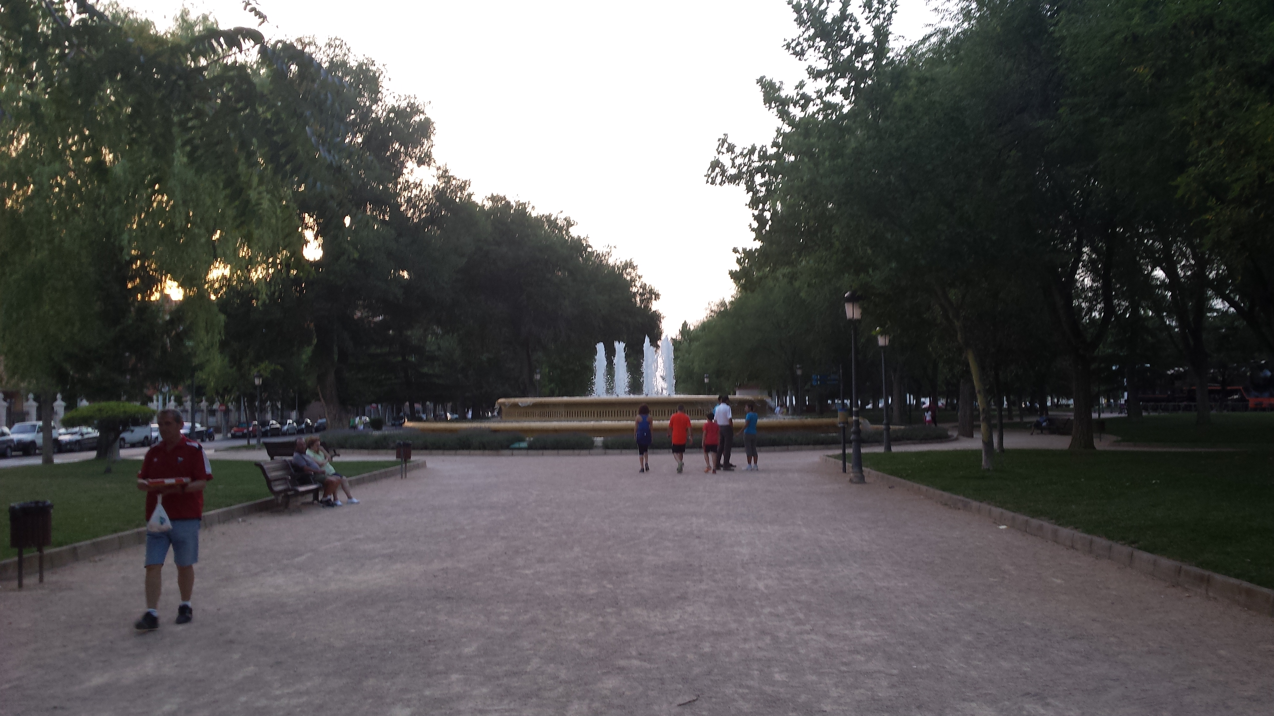 Fuente del Parque Lineal. Parque Lineal de Albacete